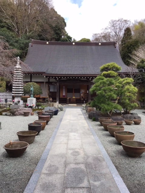 妙圓寺本堂